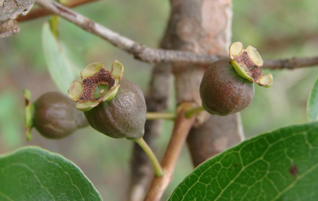 Psidium myrtoides O.Berg - tem como sin. het.: P. corynanthum (Kiaersk.) Burret ; P. myrsinoides O.Berg; P. turbinatum Mattos - MYRTACEAE - Chapada Imperial - Distrito Federal - Brasil.